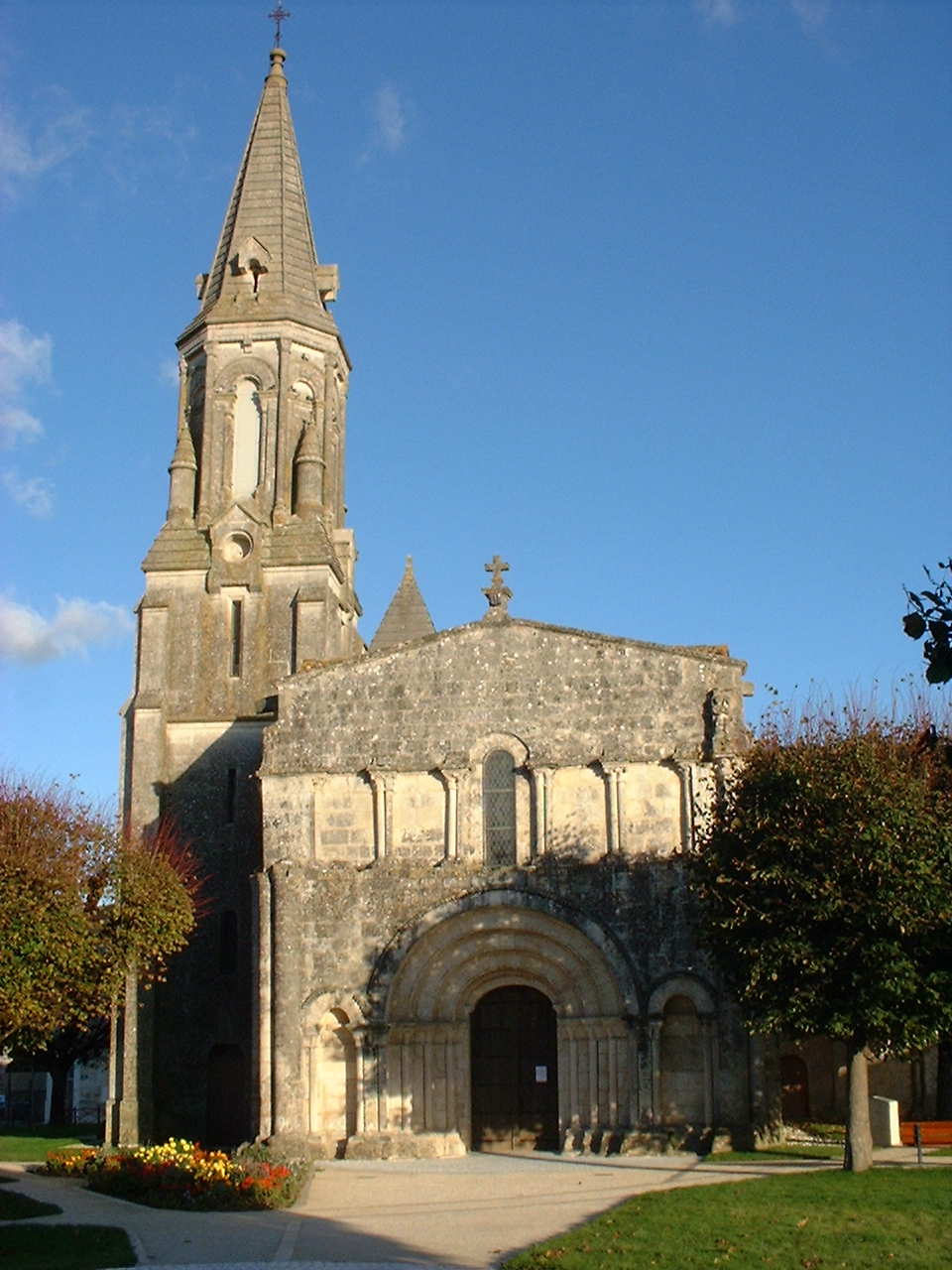 Église saint grégoire de Tesson photo personelle prise le 13 novembre 2004 à 17:28 NaSH 14 nov 2004 à 19:20 (CET)